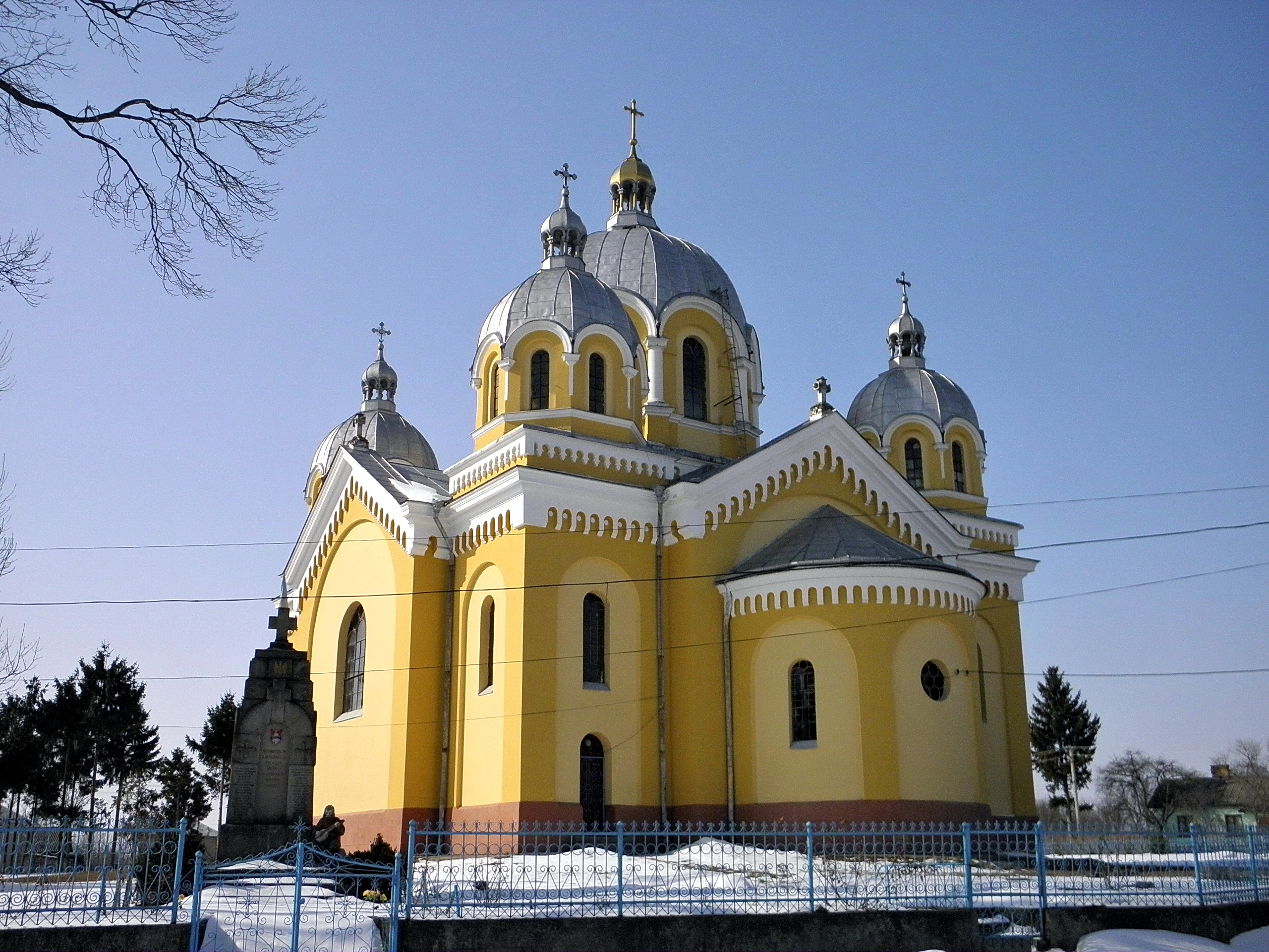 Церква Преображення Господнього(мур.), Токи